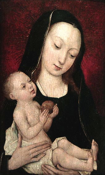 Probablement volet gauche d'un diptyque de dévotion dans la tradition weydenienne.